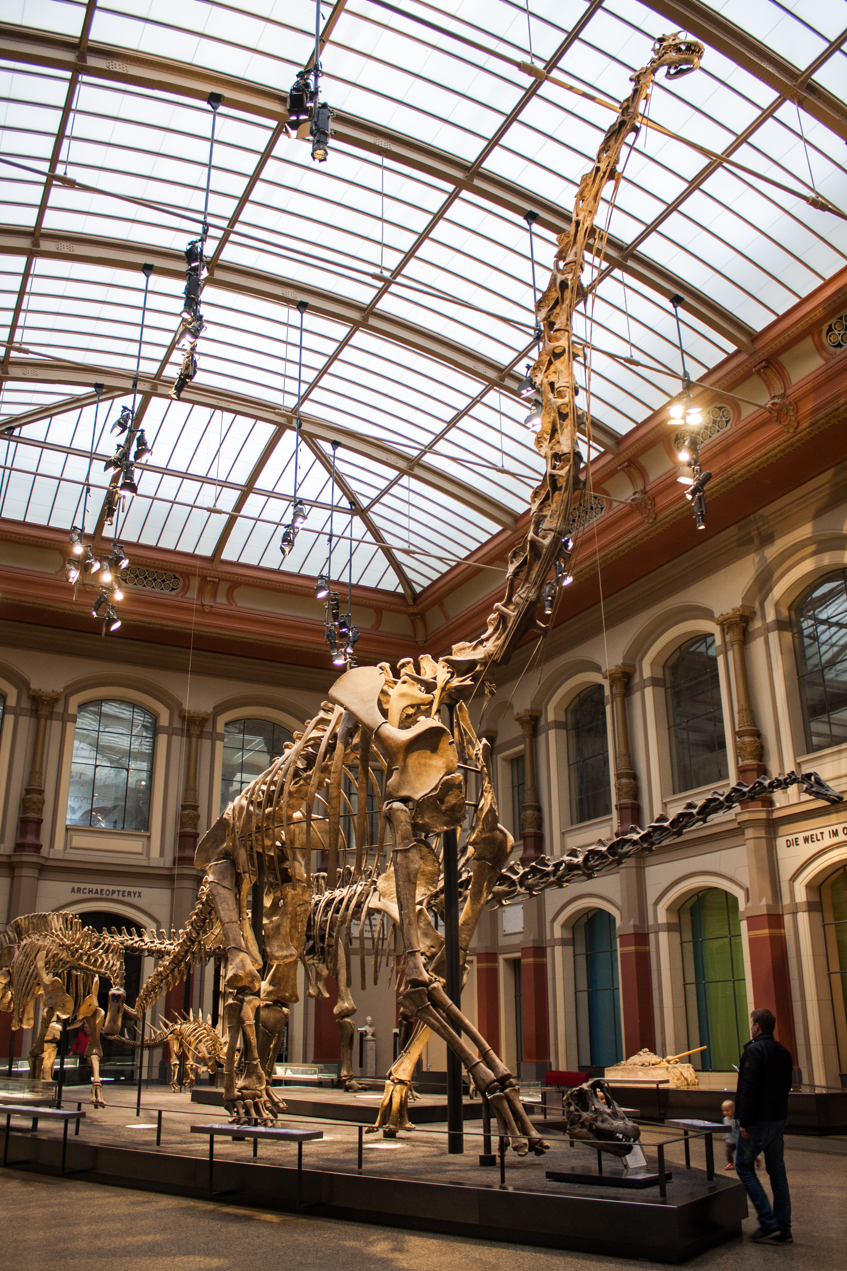 Museum für Naturkunde